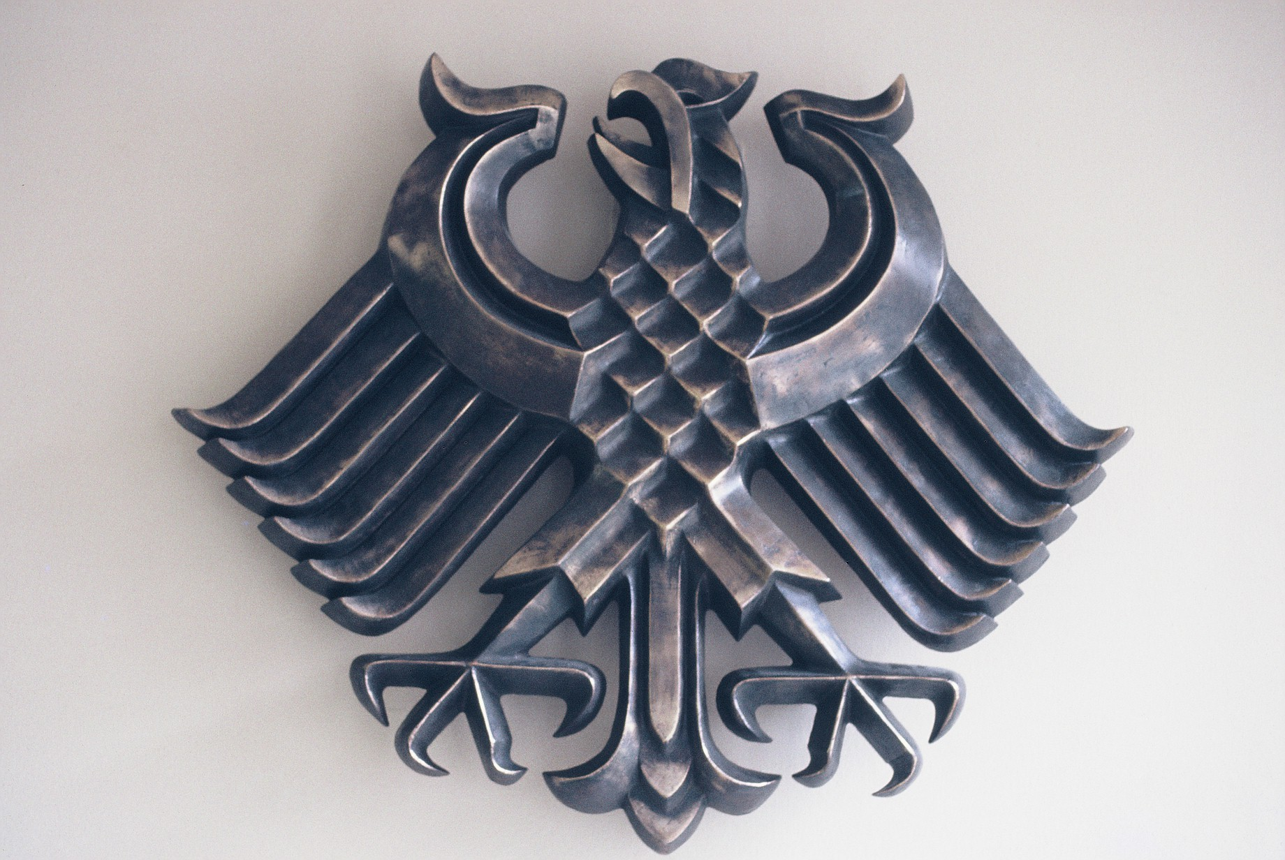 Bronze 160 cm x 140 cm